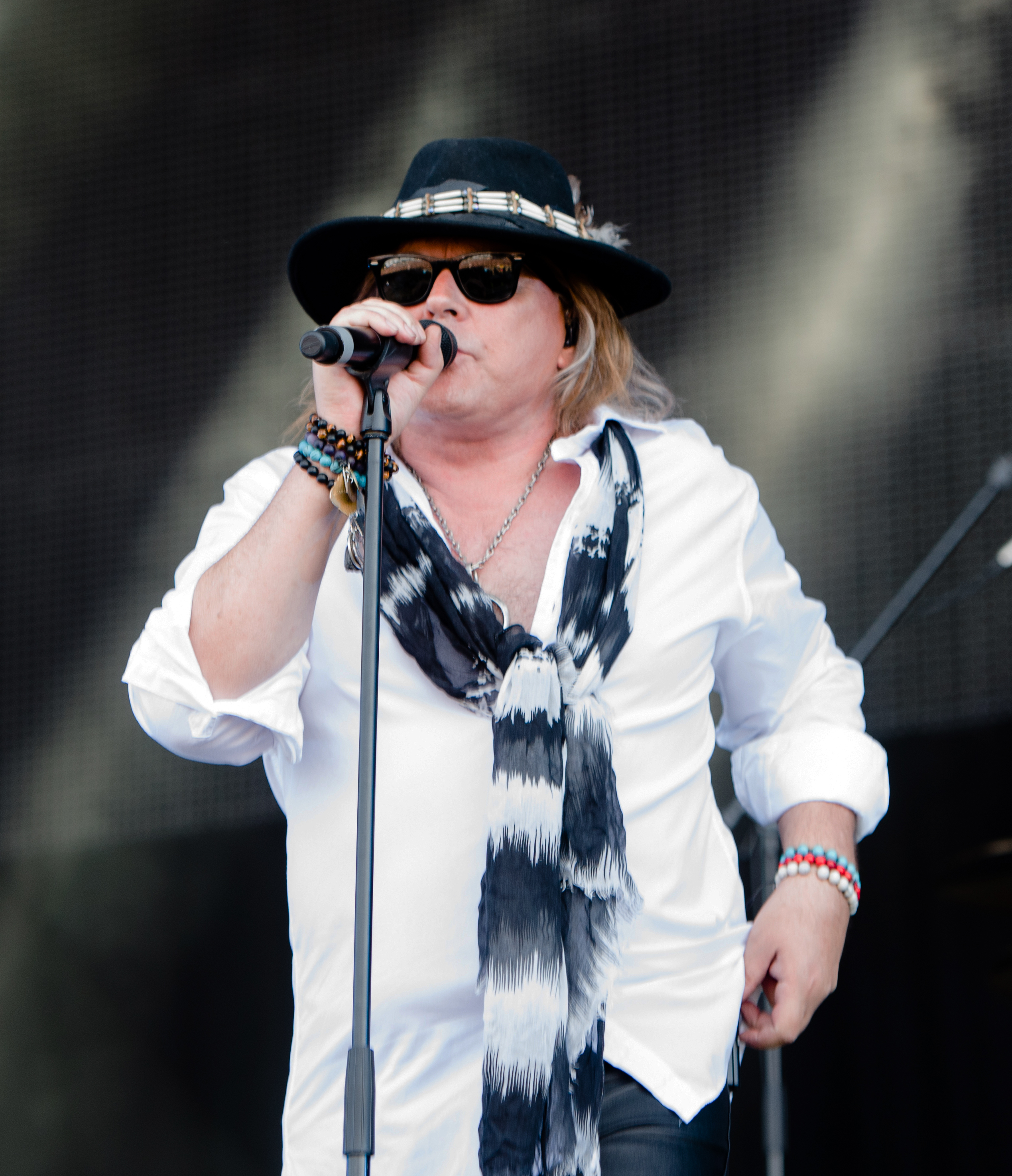 Dokken beim Wacken Open Air 2018